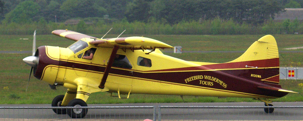 Freebird Wilderness Tours De Havilland Canada DHC-2 Beaver (N130WA) auf der Flugzeugshow am Airport Niederrhein während der Geburtstagsfeier zum einjährigen Bestehens des Flughafens.